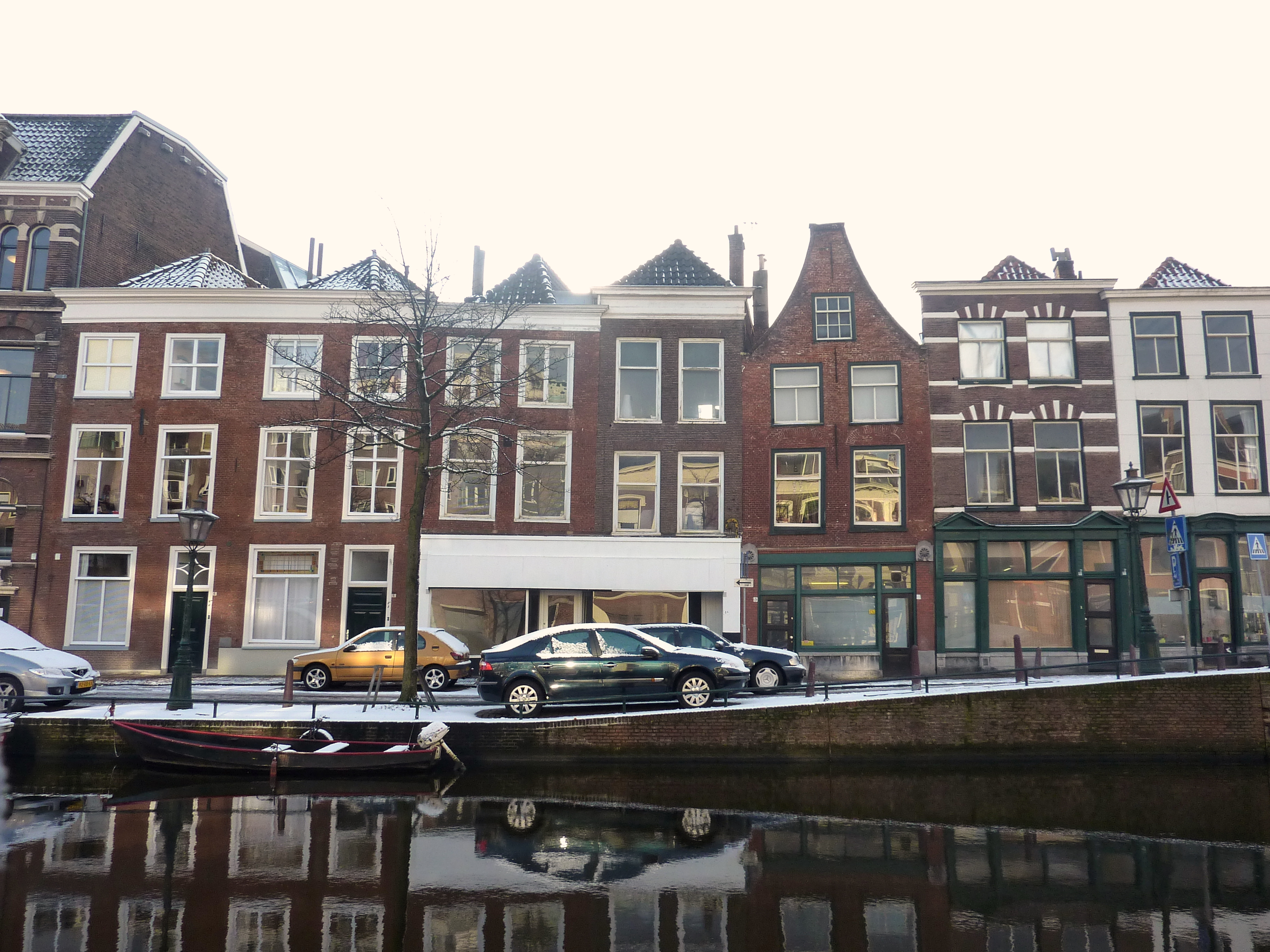 Leiden - Aalmarkt - diverse